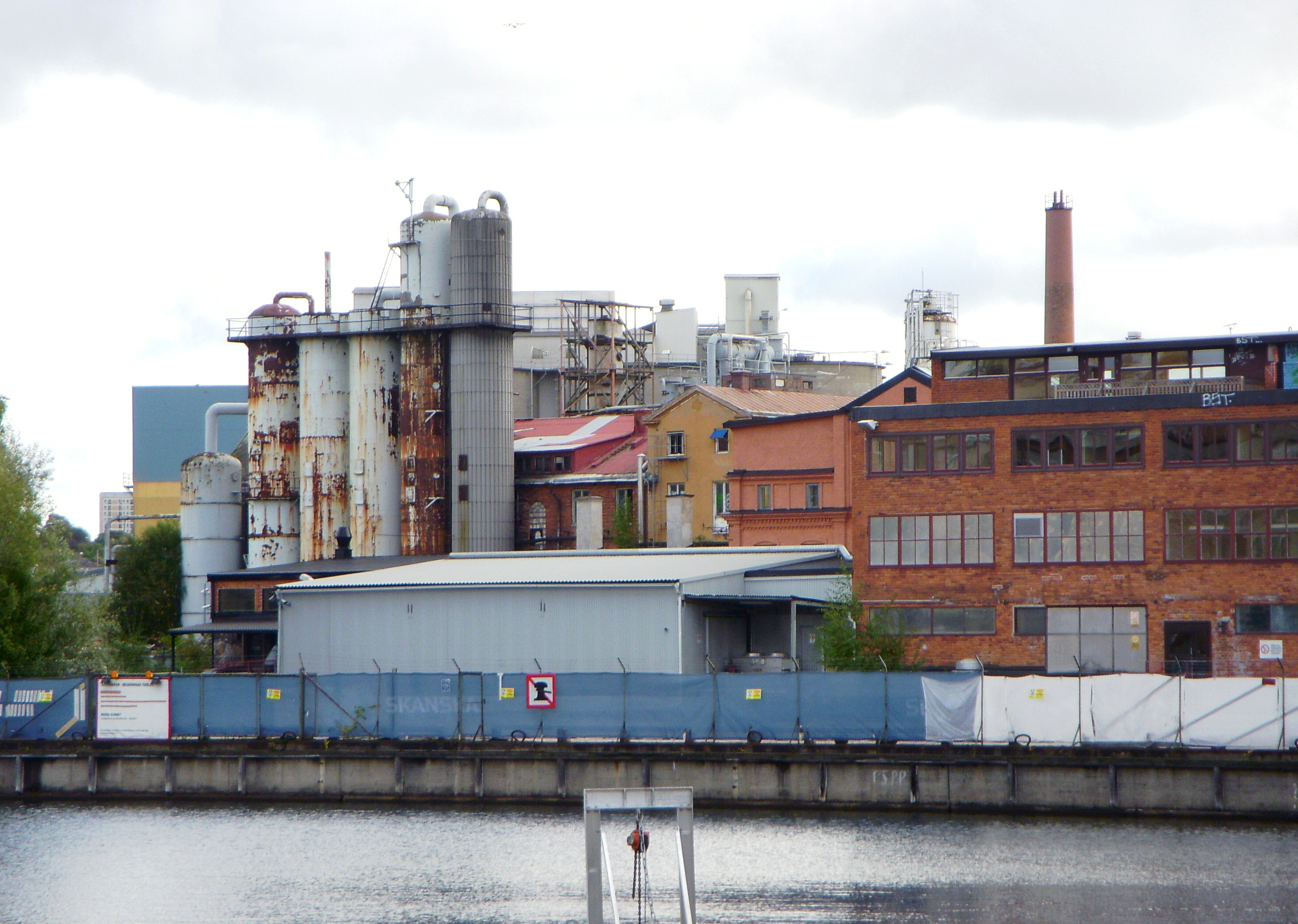 Kolsyrefabriken på Lövholmen, Liljeholmen, Stockholm